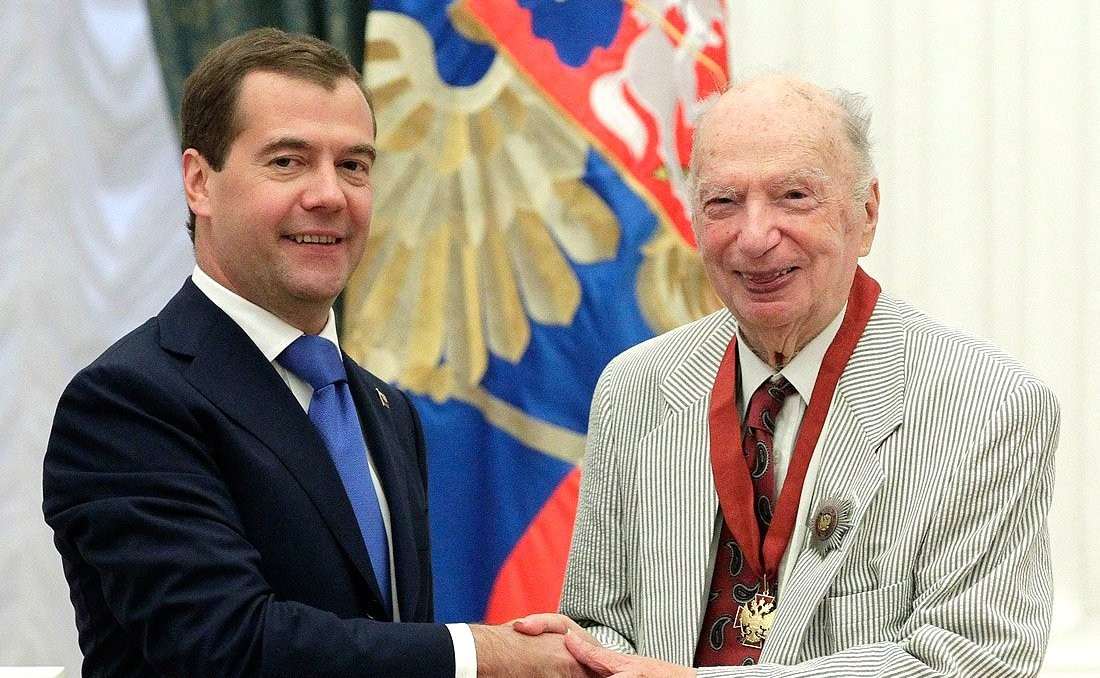 МОСКВА, КРЕМЛЬ. Церемония вручения государственных наград. Орден «За заслуги перед Отечеством» II степени вручен композитору Оскару Борисовичу Фельцману.